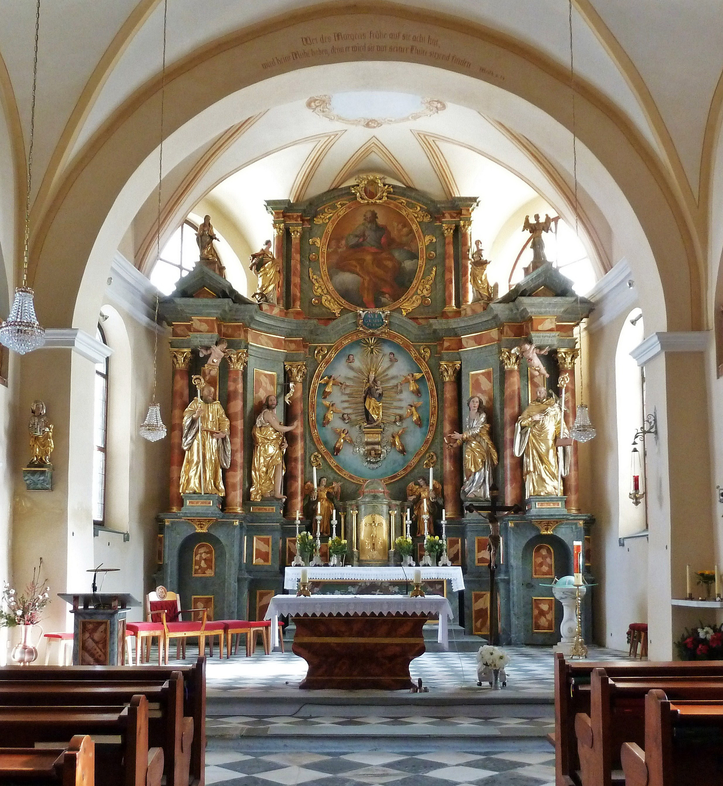 Kath. Pfarrkirche Maria Himmelfahrt (Maria Rain), der Hochaltar im Chorraum